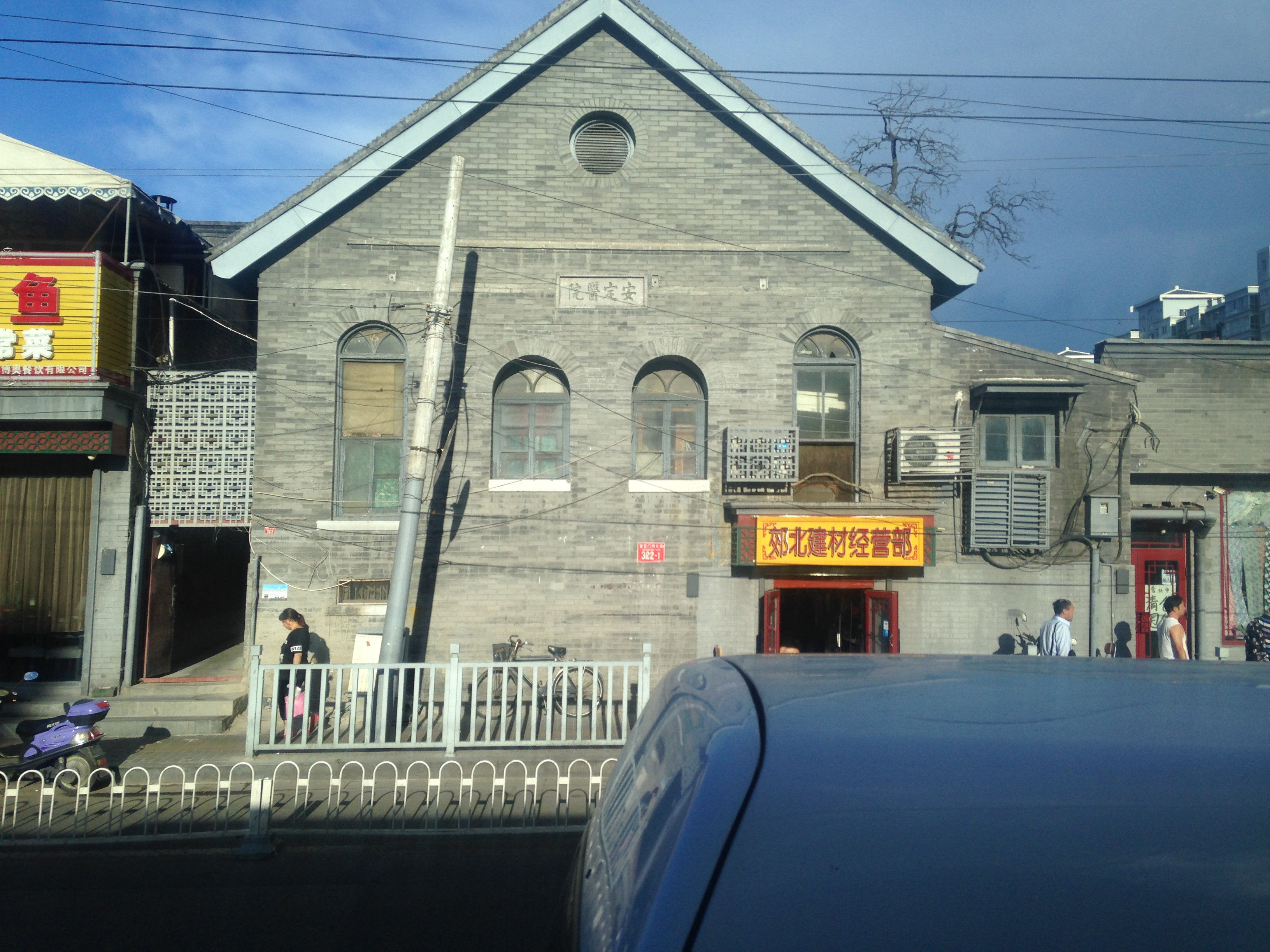 交道口交差点の北側にある旧安定医院